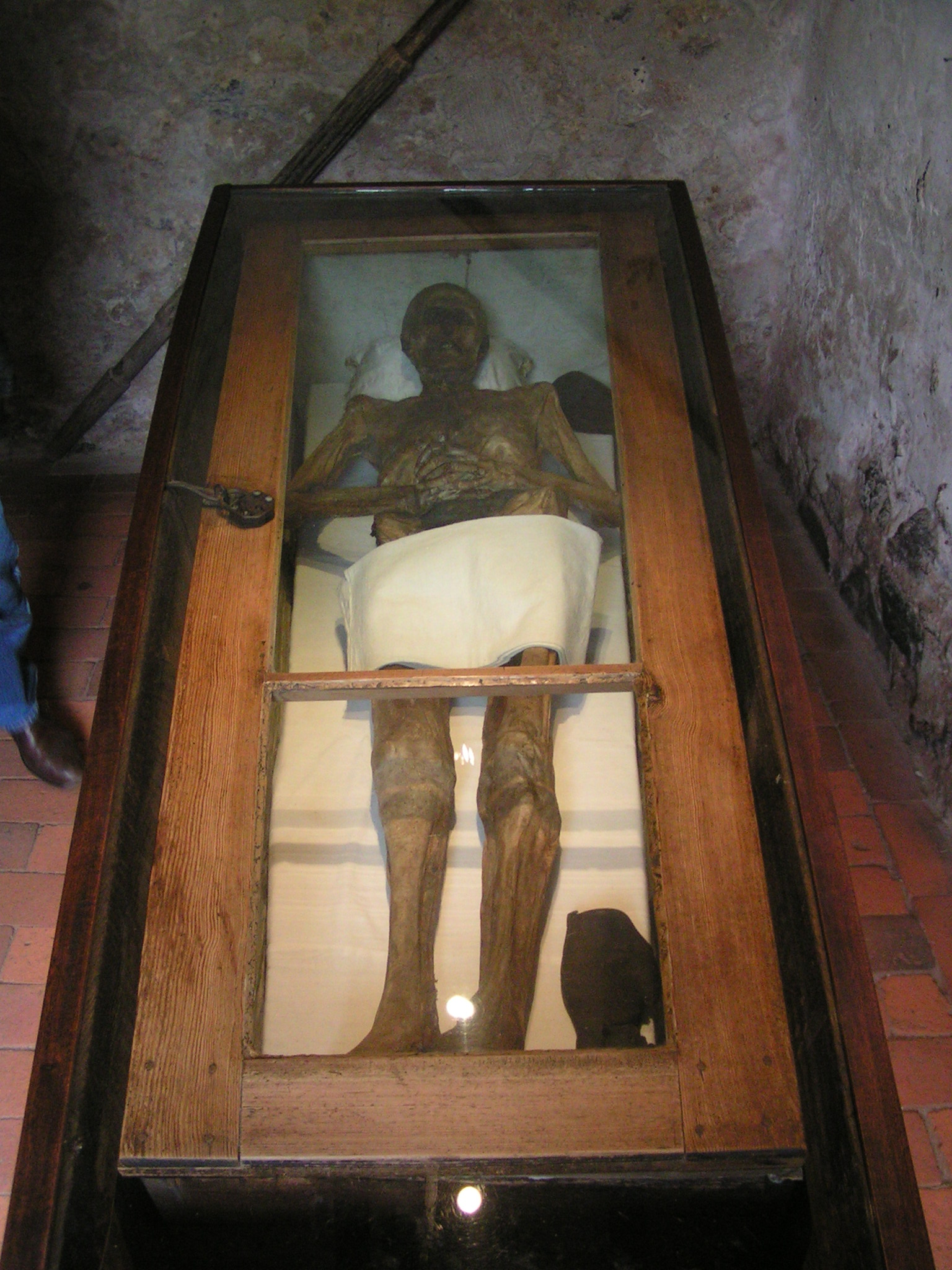 komplette Mumie von Ritter Kahlbutz in Kampehl Source: selbst fotografiert, 13.08.2005 in Kampehl/Brandenburg